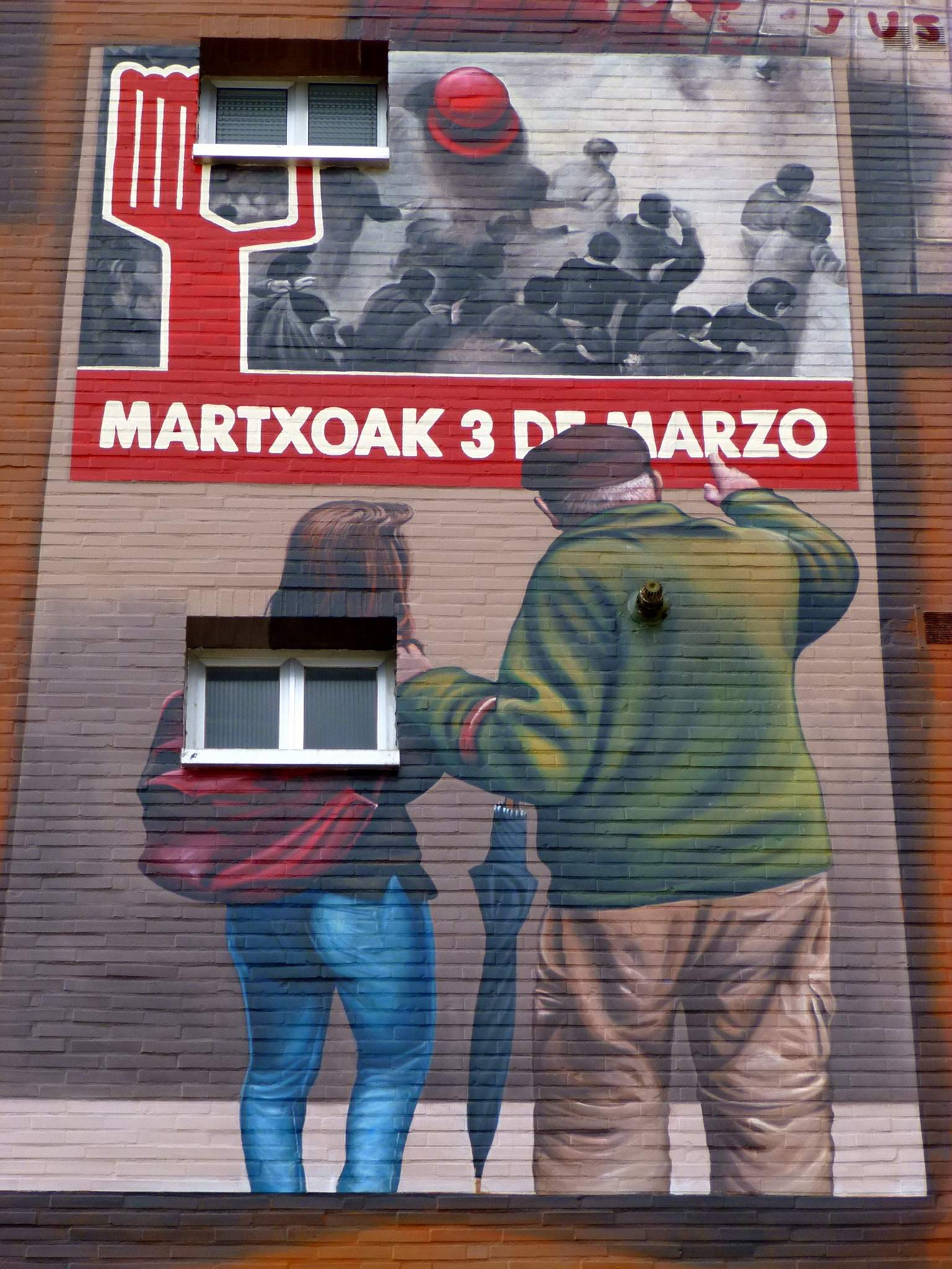 Barrio de Zaramaga, en Vitoria-Gasteiz. Mural alusivo a los sucesos del 3 de marzo de 1976